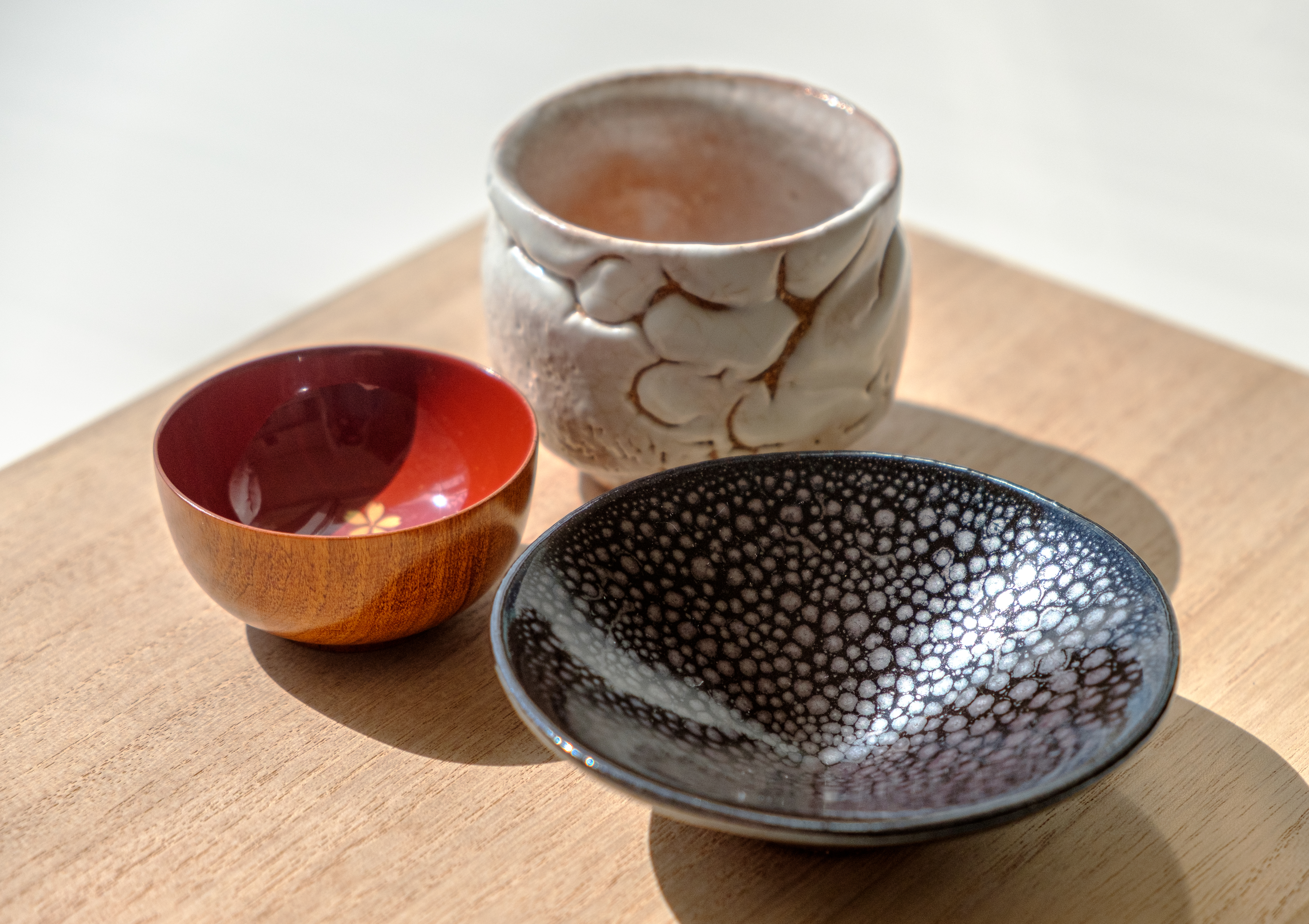 3 different styles of traditional Japanese sake cups